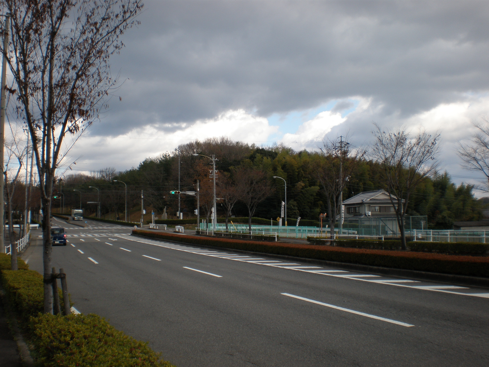 愛知県小牧市の大草城跡地がある丘